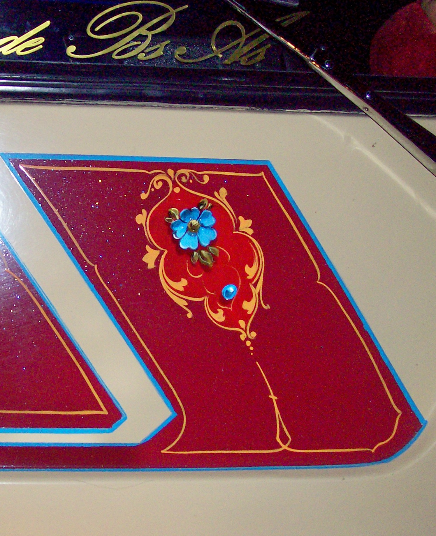 Colectivo. Fileteado. Buenos Aires, Argentina.